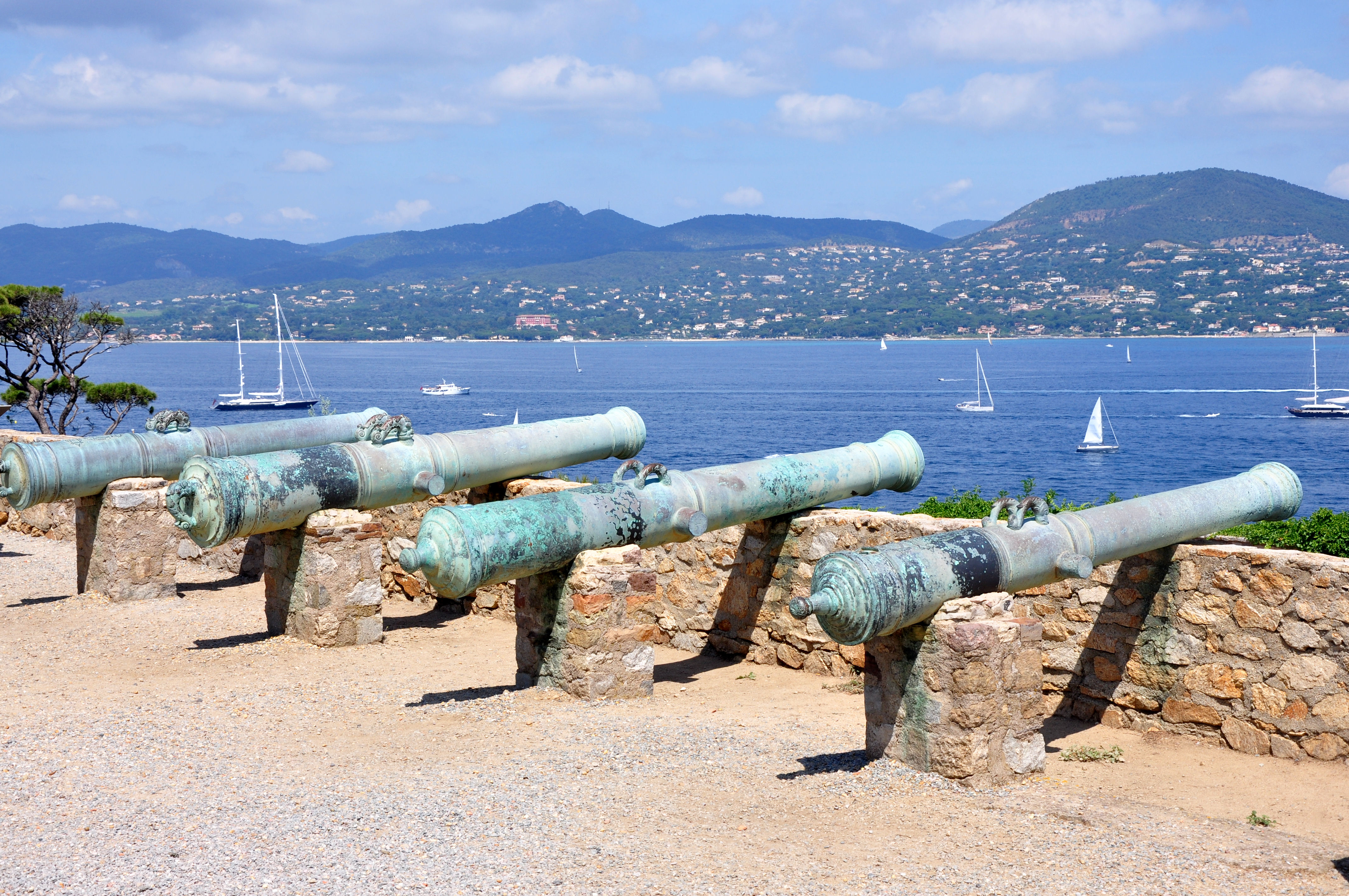 Saint-Tropez - Canons de la Citadelle